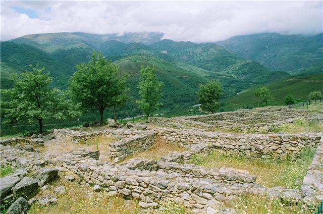 Casas excavadas por Fernando Fernández Gómez en el castro del Freíllo. El Raso. Candeleda. Ávila (España)